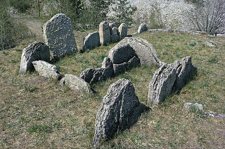 RAÄ-nummer Kumla 25:1. Hällkista strax söder om Yxhult. Bilden troligen tagen mitten av 1970-talet. Motiv: Kumla 25:1 Nyckelord: Riksintressen Kategori: Stenkammargrav RAÄ-nummer Kumla 25:1. Hällkista strax söder om Yxhult. Bilden troligen tagen mitten av 1970-talet. Kumla 25:1.